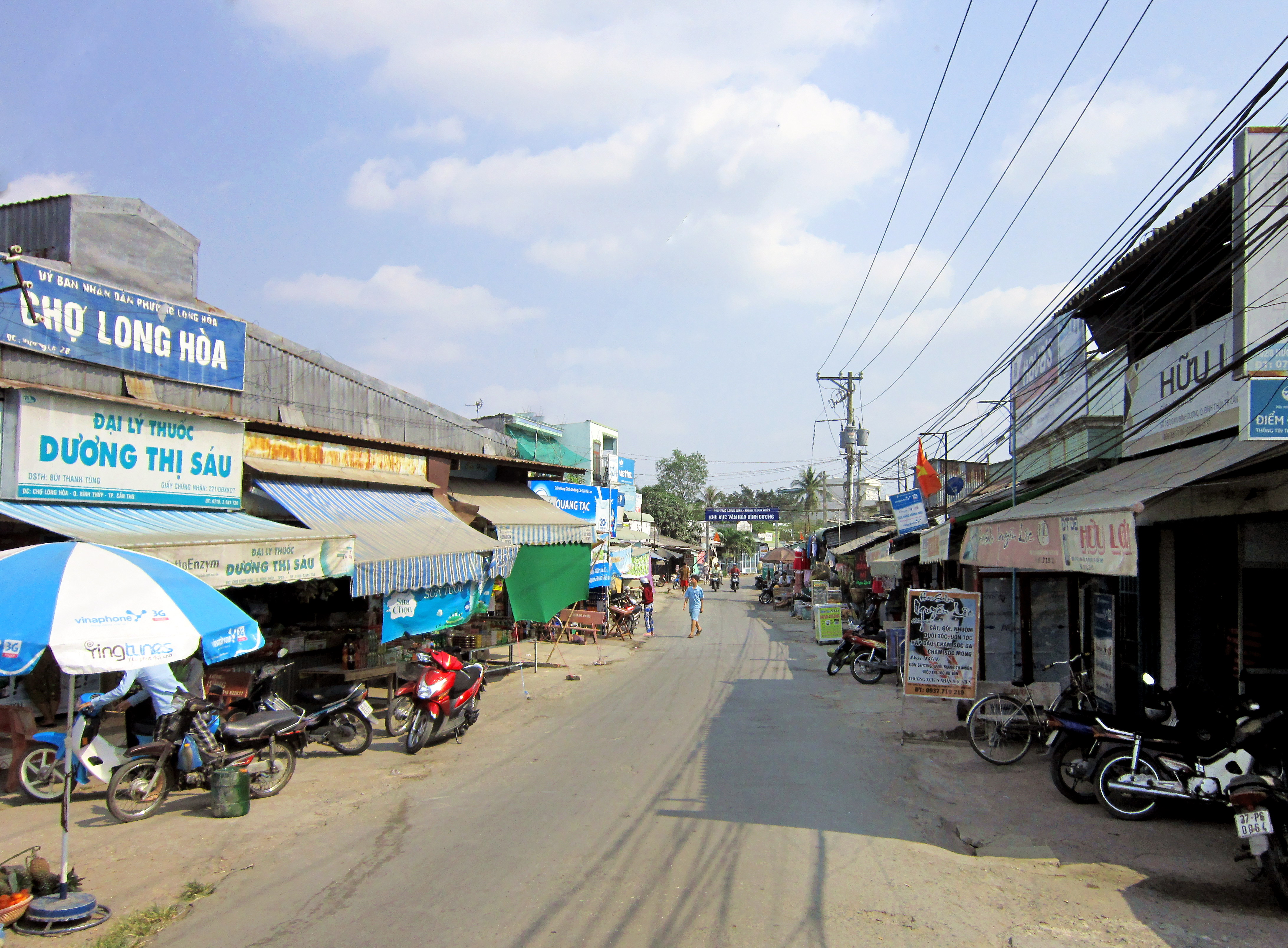 Phố chợ Long Hòa ở phường Long Hòa, quận Bình Thủy, thành phố Cần Thơ, Việt Nam.